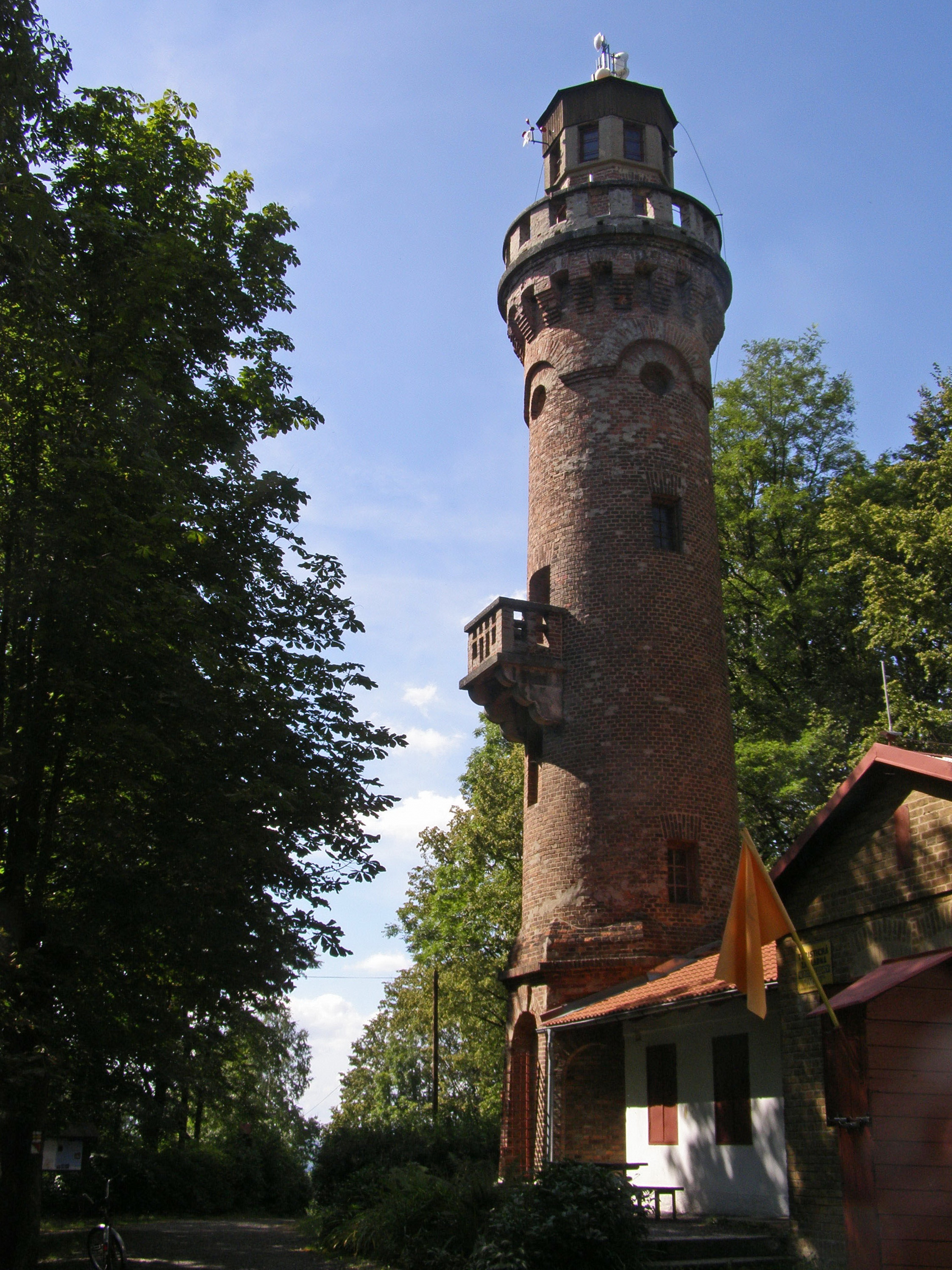 Frýdlant, rozhledna